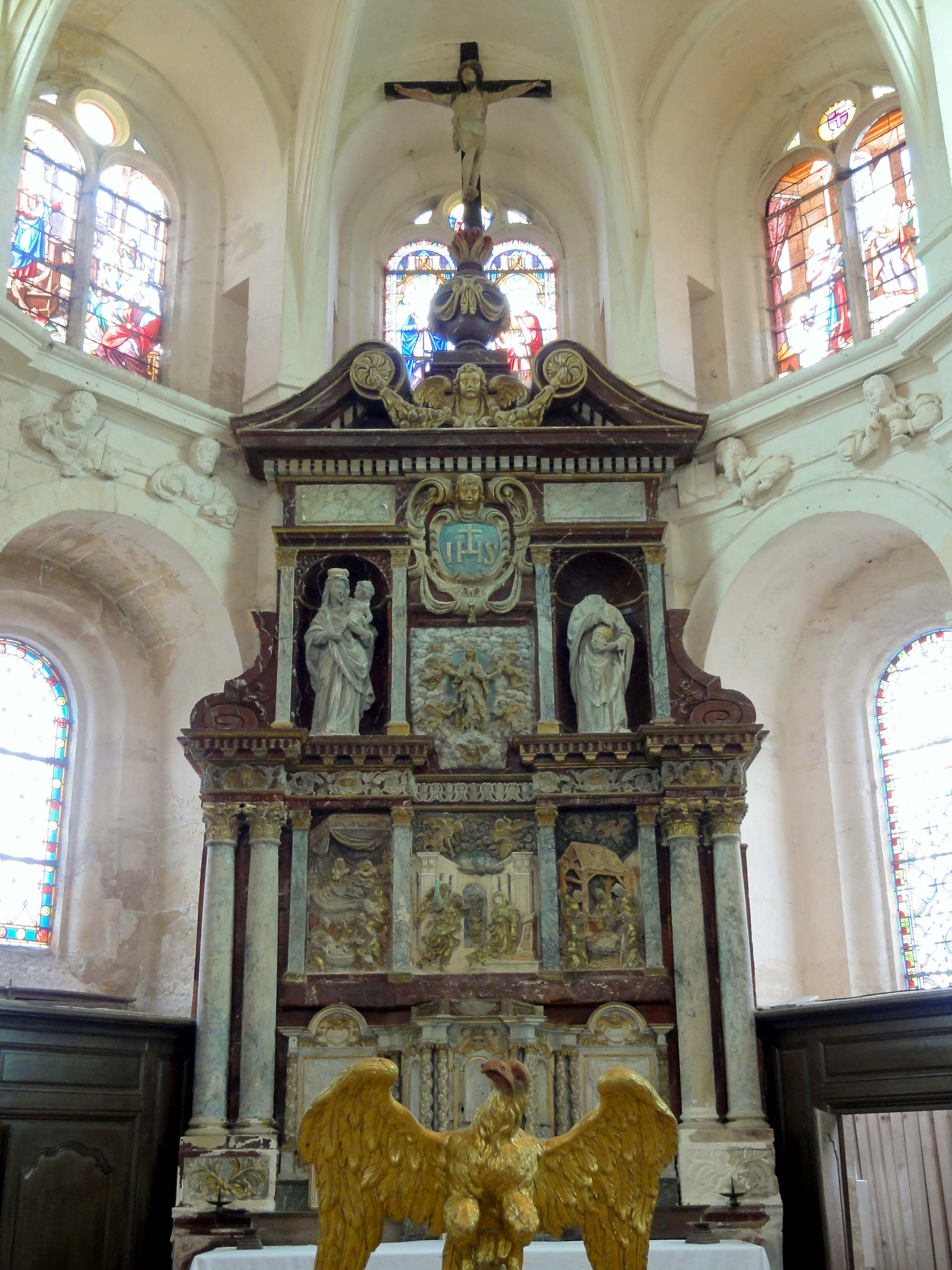 Retable du maître-autel, XVIIe siècle.